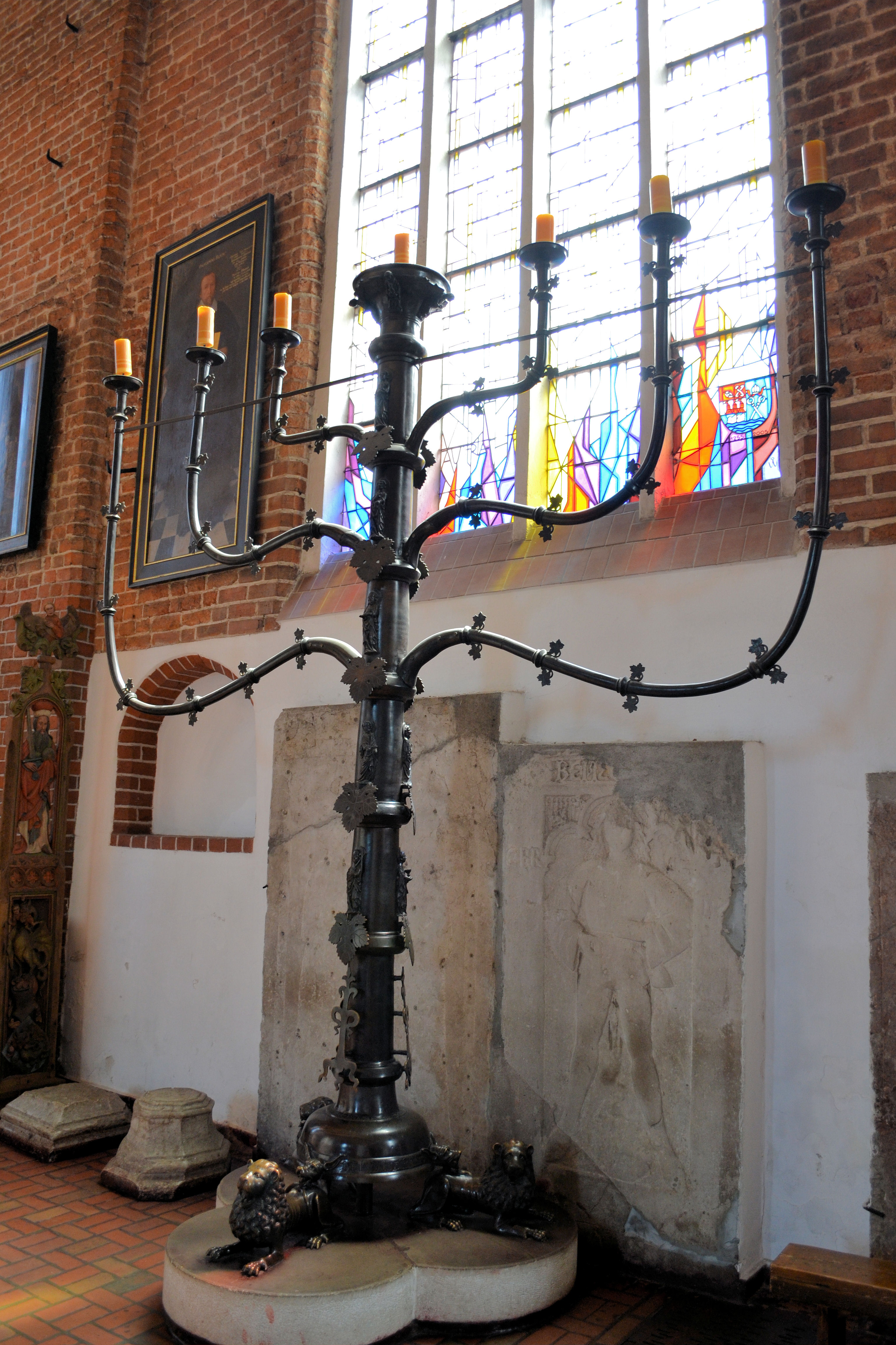 Gotycki świecznik siedmioramienny w katedrze w Kołobrzegu